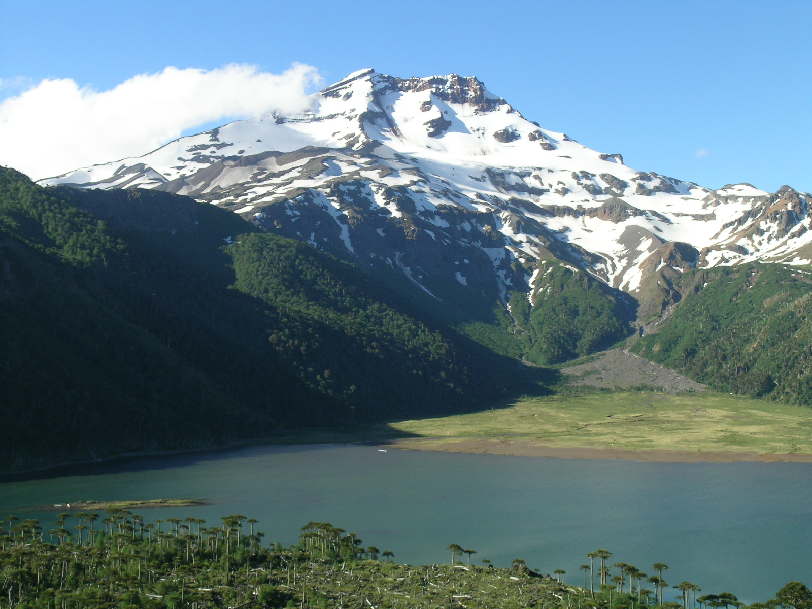 Tolhuaca Volcano, Chile.